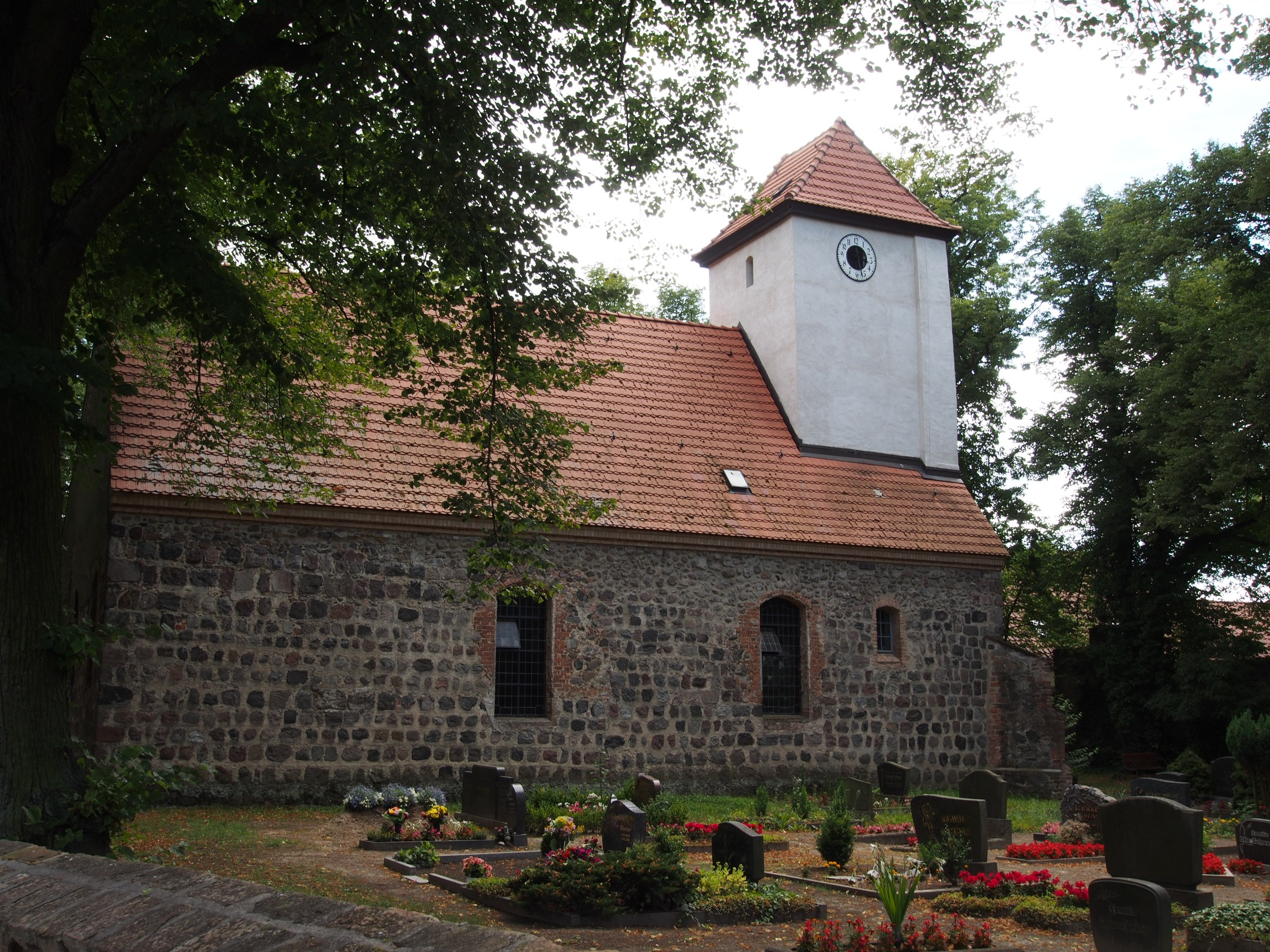 Die Dorfkirche Kiekebusch in Schönefeld (Brandenburg) entstand vermutlich im 14. Jahrhundert und wurde in den Jahren 1693 und 1694 nach Süden hin durch den Anbau einer Patronatsloge erweitert.